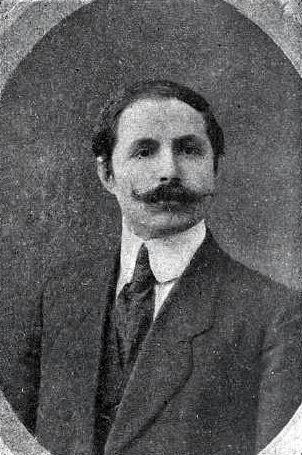 Maurice Puget, organier toulousain, fils -et collaborateur- de Jean-Baptiste Puget, en 1921 (ainsi que petit-fils de Théodore Puget).